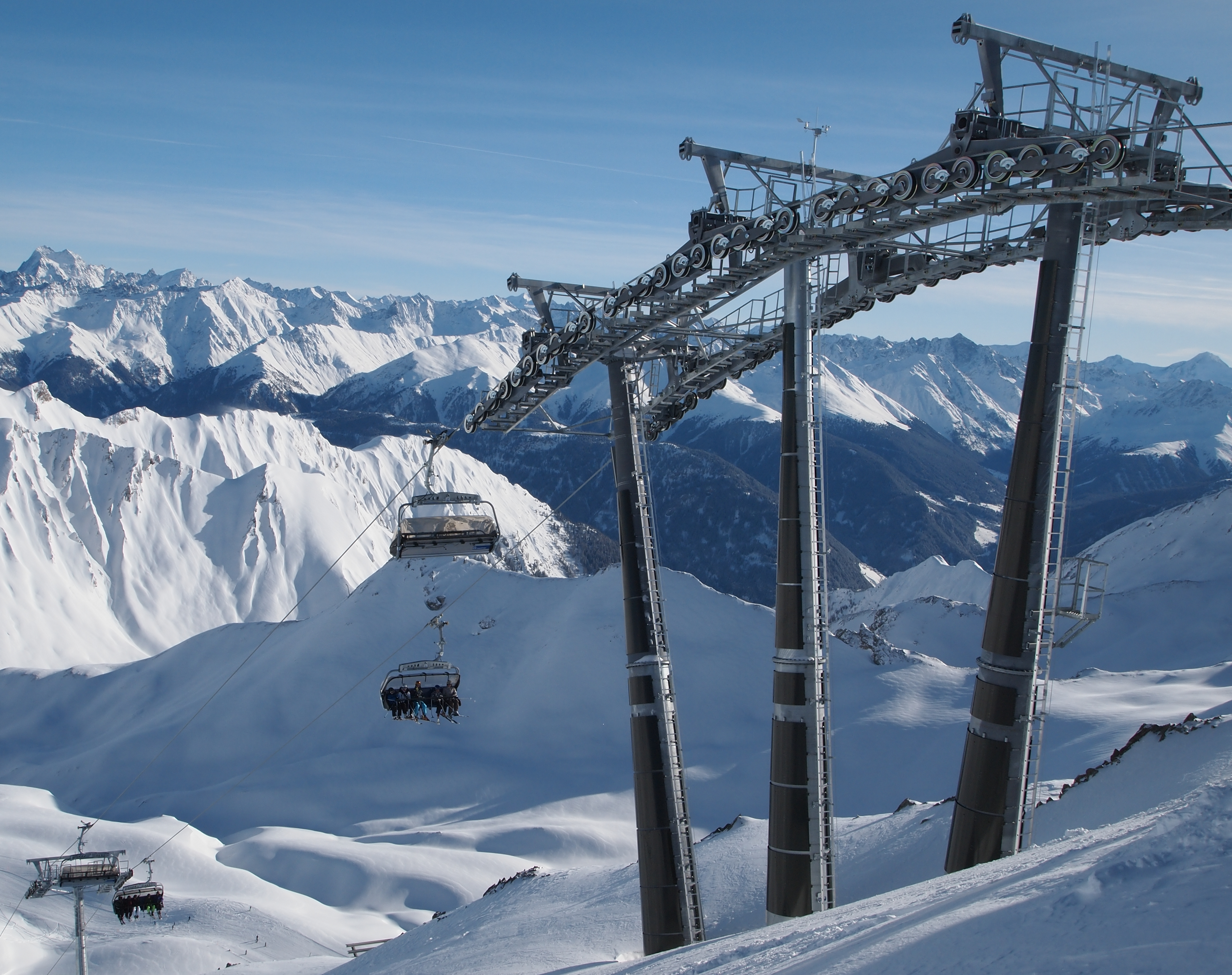 De Masnerkopfbahn in het Masner skigebied van Serfaus, Tirol, Oostenrijk.